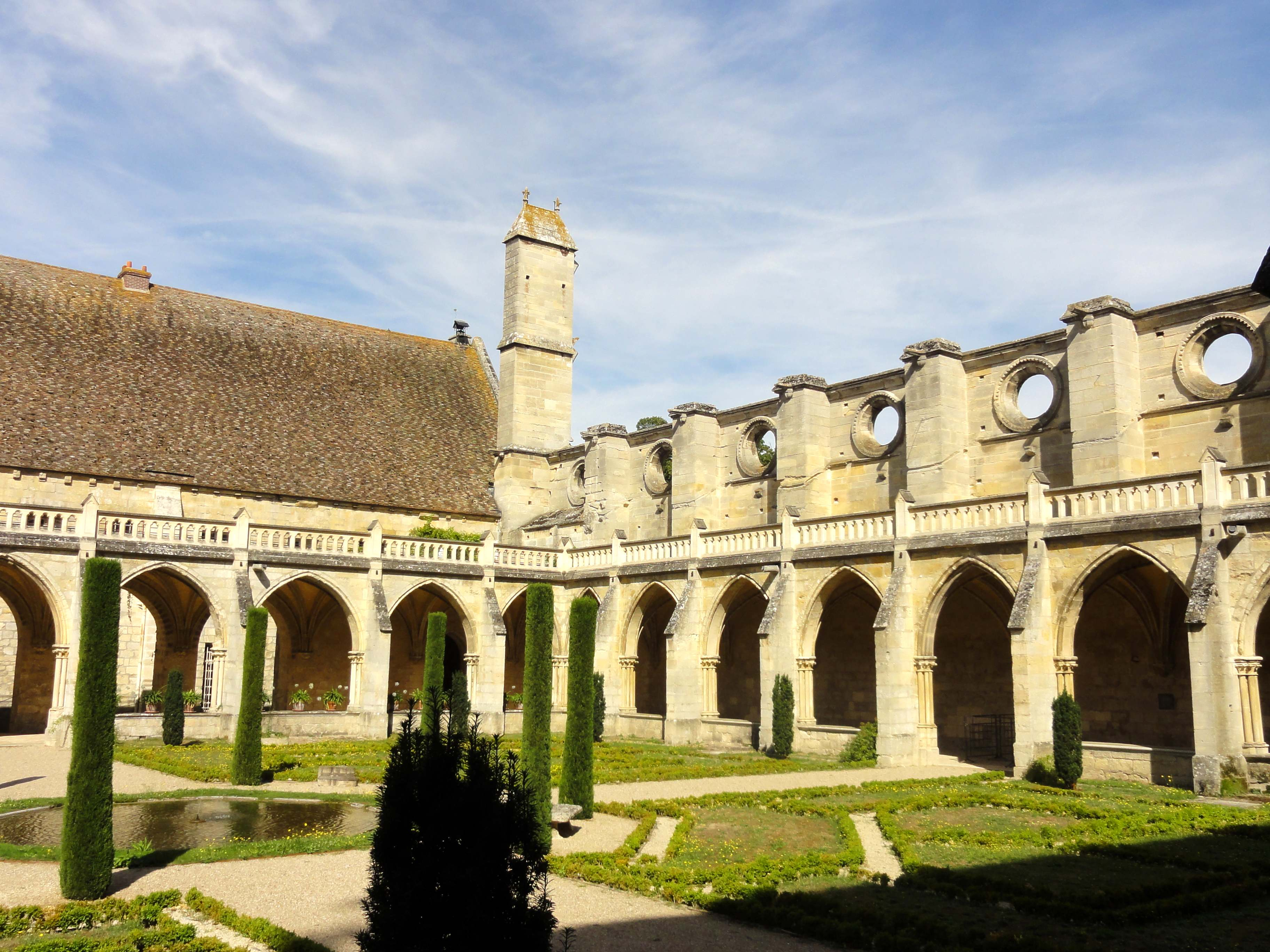 Cloître - voir titre.